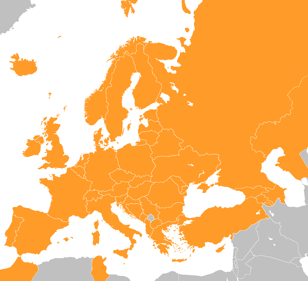 Représentation géographique des parties contractes de l'accord européen relatif au transport international des marchandises dangereuses par route. Les territoires dont je ne suis pas certains de l'application de l'ADR (Groënland, Svalbard, etc.) sont laissés en gris.